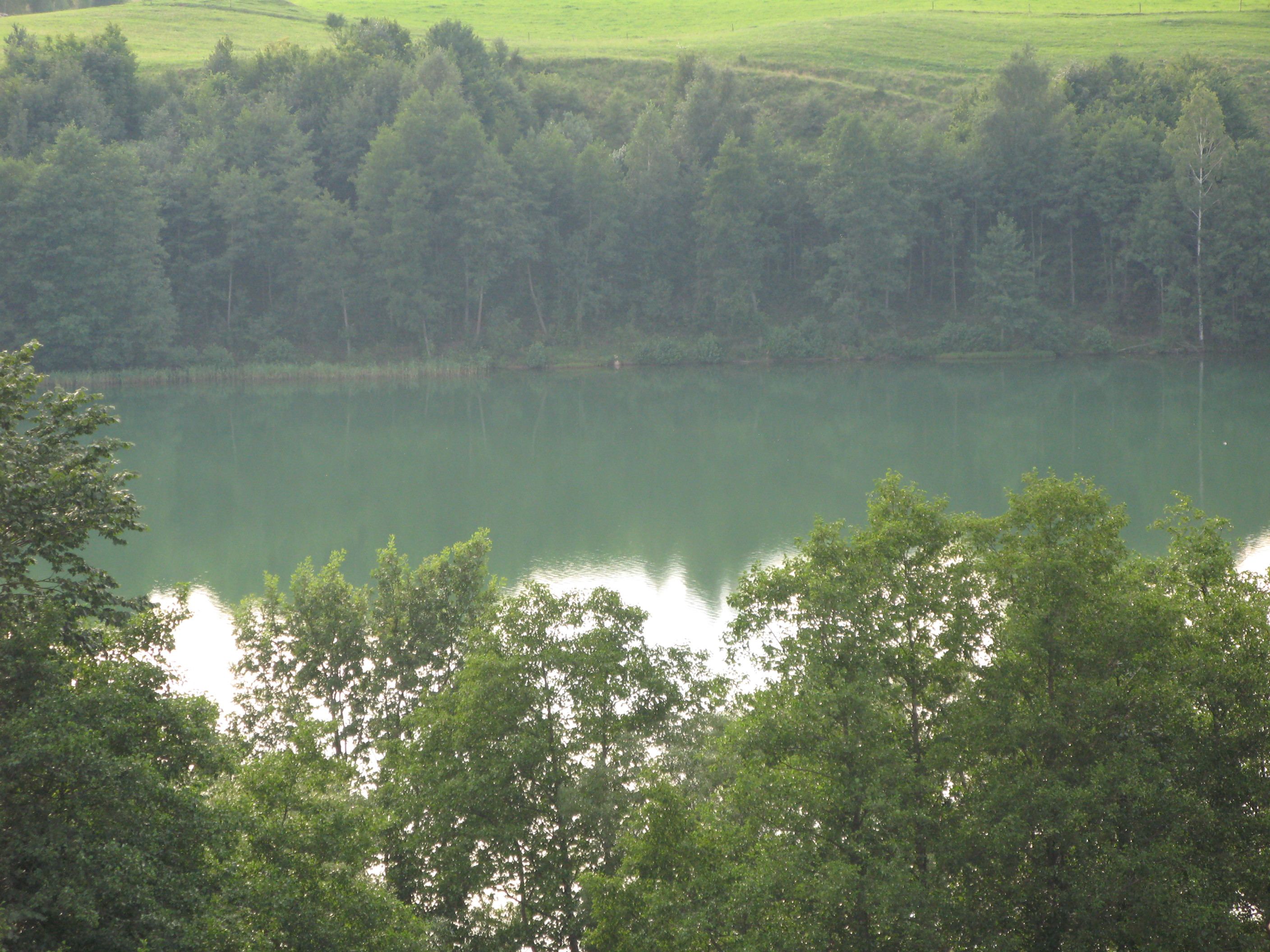 Boczne lake, Poland, Suwalki region